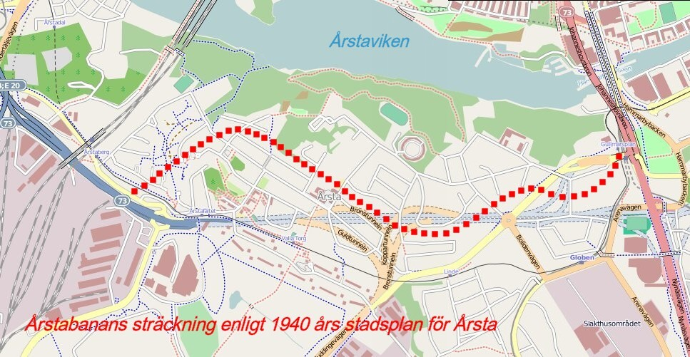 Den ursprunglig planerade sträckningen av "Årstabanan" i Stockholm (inlagd på en karta från 2009) This map may be incomplete, and may contain errors. Don't rely solely on it for navigation.